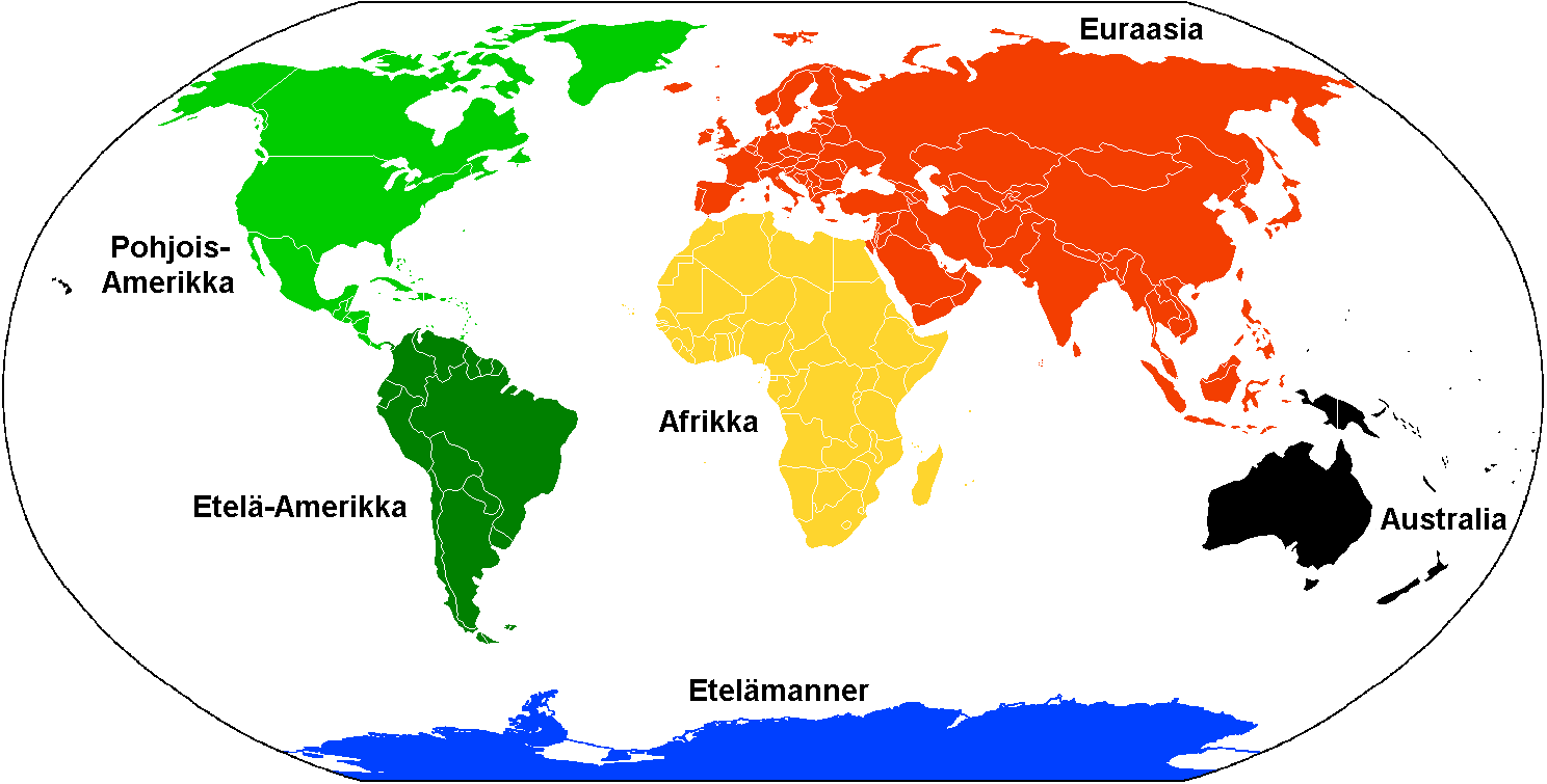 Description